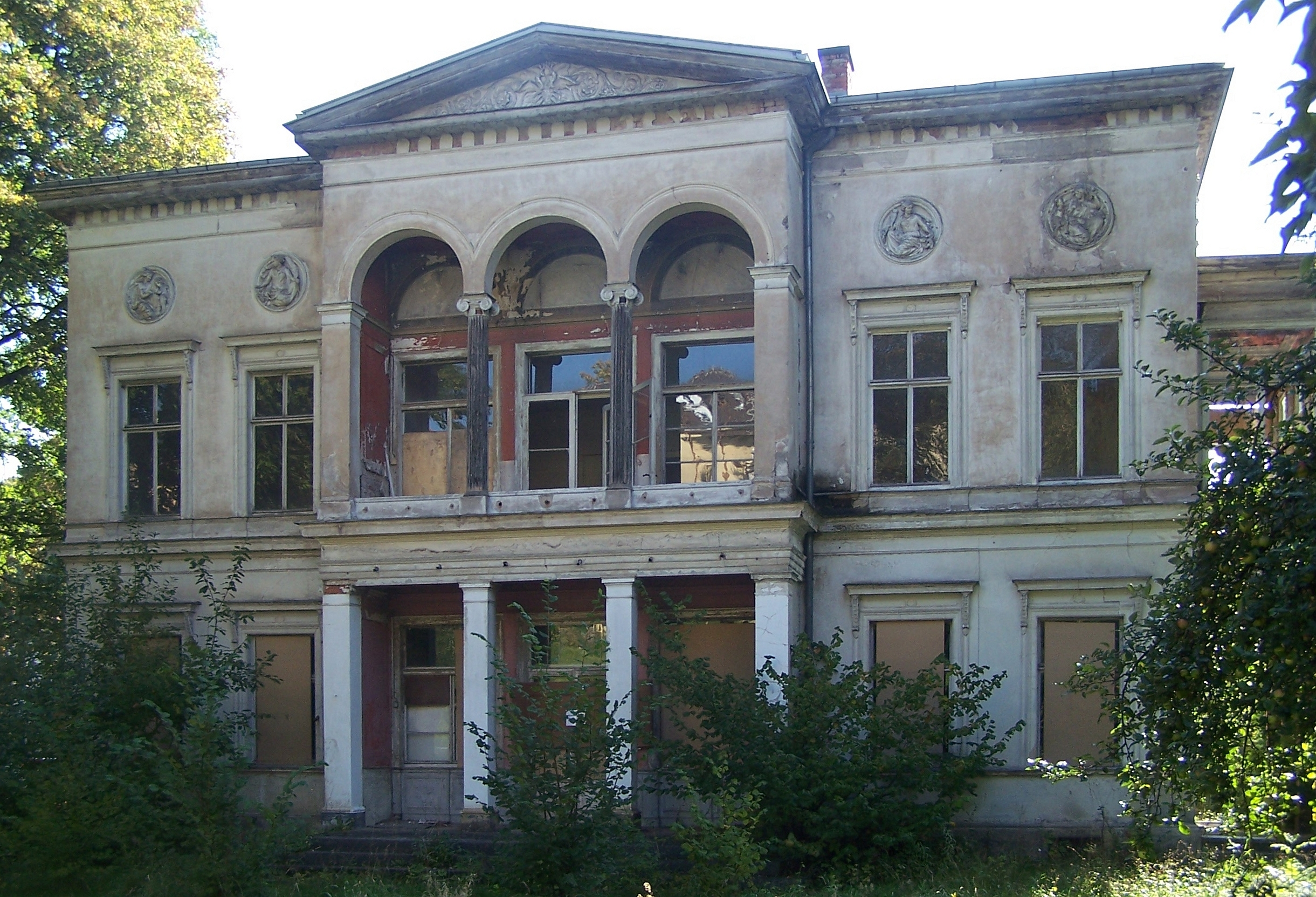 Die vornehme, 1866 für die Kunstreiterin Christina Friederike Loisset geb. Krause erbaute Villa im Eisenacher Mariental markierte bis 1905 die Bebauungsgrenze der Stadt in der Flussaue des Marientaler Bachs nördlich des Prinzenteichs. Spätere Nutzer wandelten das Gebäude in ein Zweifamilenhaus um. Nach jahrzehntelangem Leerstand wurde das Haus wegen irreparabler Bauschäden 2014 abgebrochen.